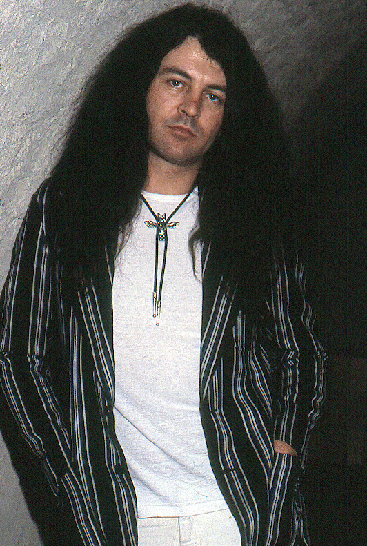 Fotografía de Ian Gillan antes una actuación de la Plaza de Toros de Barcelona en 1983.